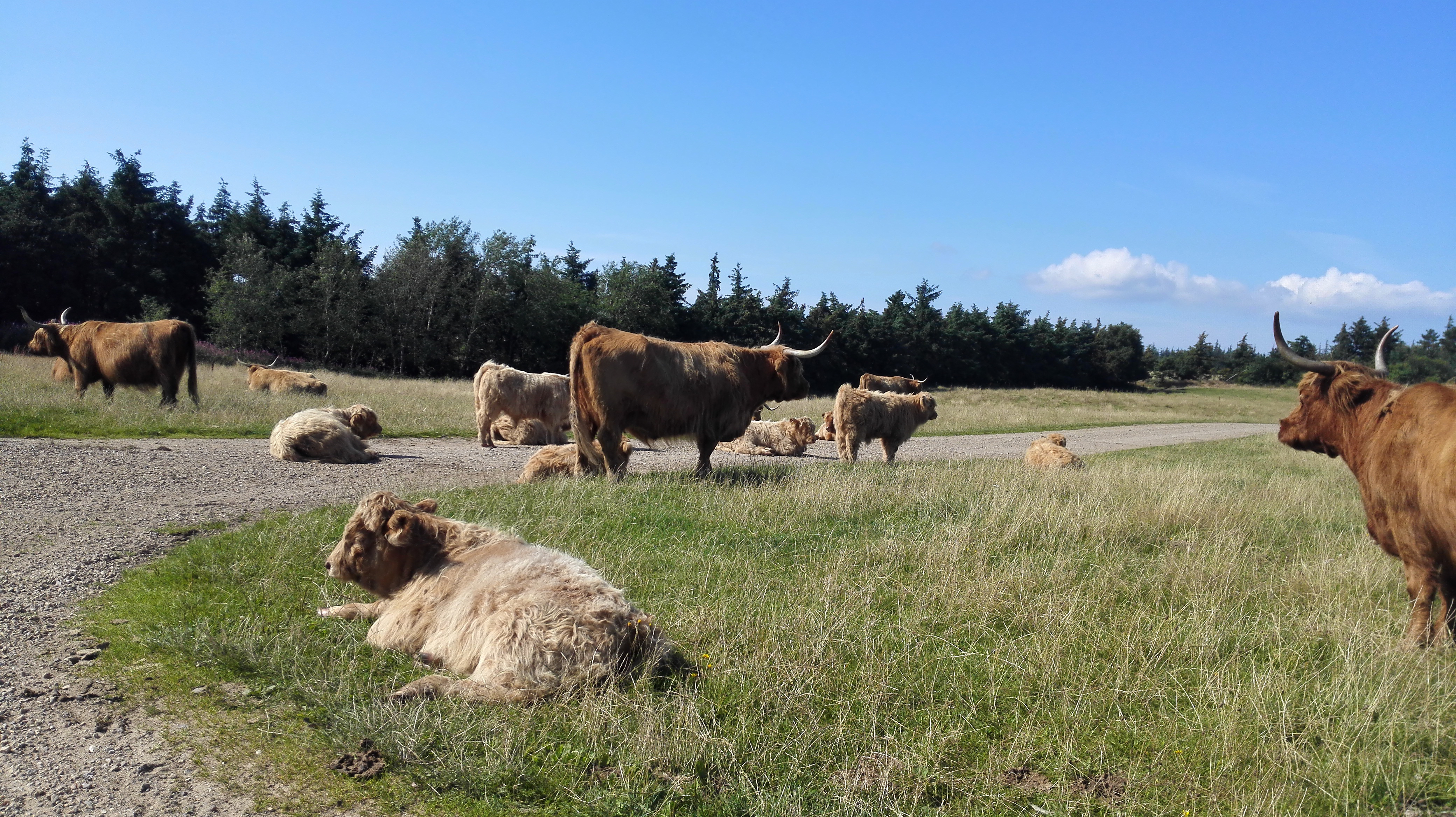 Skotsk højlandskvæg bliver brugt til naturpleje i Ådalen mellem Hjerting og Sædding